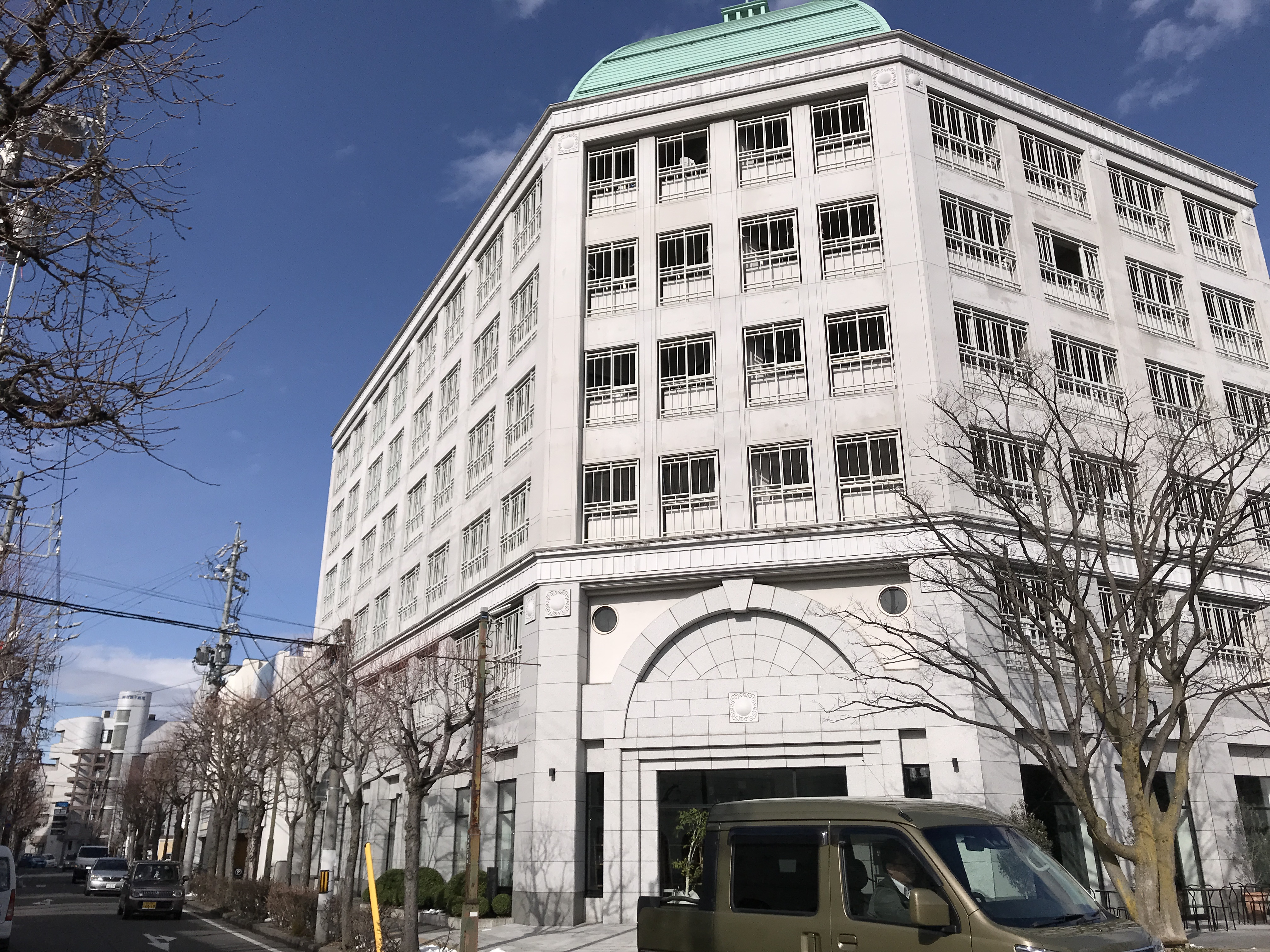 旧・松本市役所(復元)